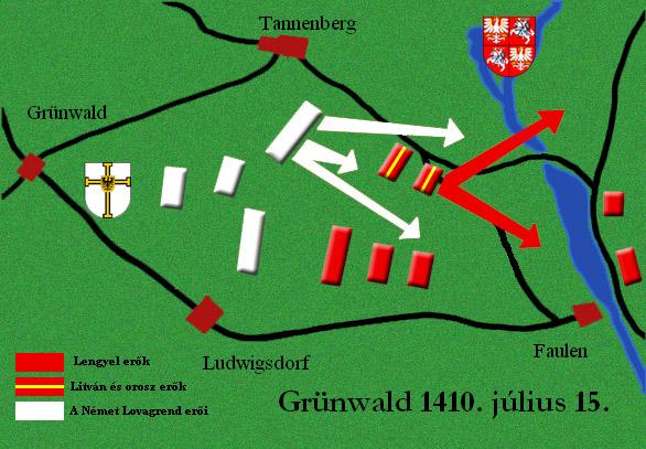 A Grünwaldi csata térképe.